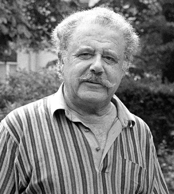 Eli Asser in het programma Monologen van de IKON, 1990